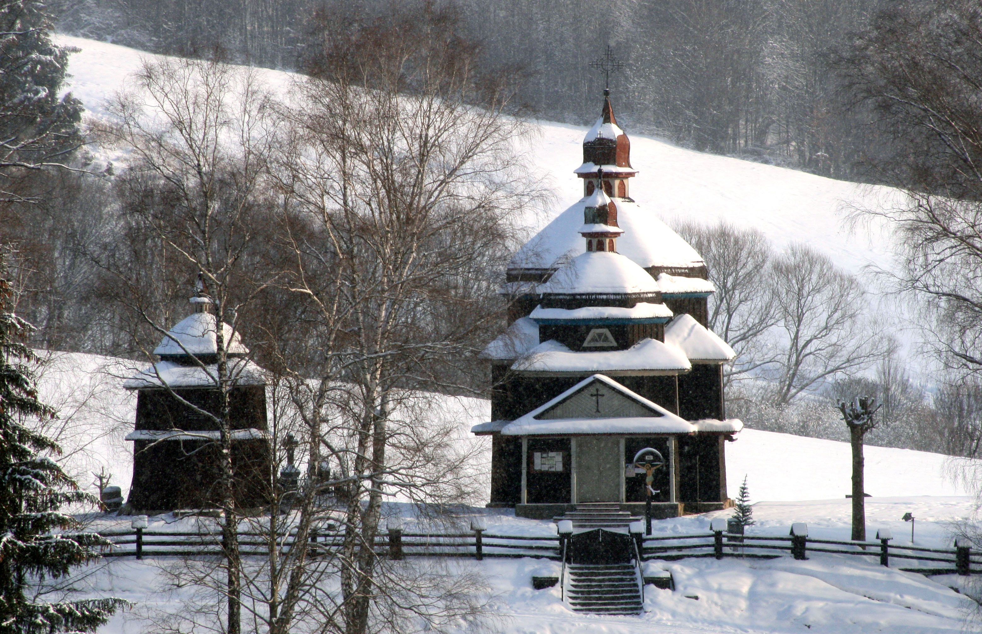 Cerkov bojkovského slohu v Nižnom Komárniku bola postavená v roku 1938 a patrí do súboru národných kultúrnych pamiatok